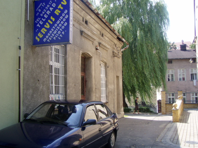 Chrzanower Synagogue in Oświęcim